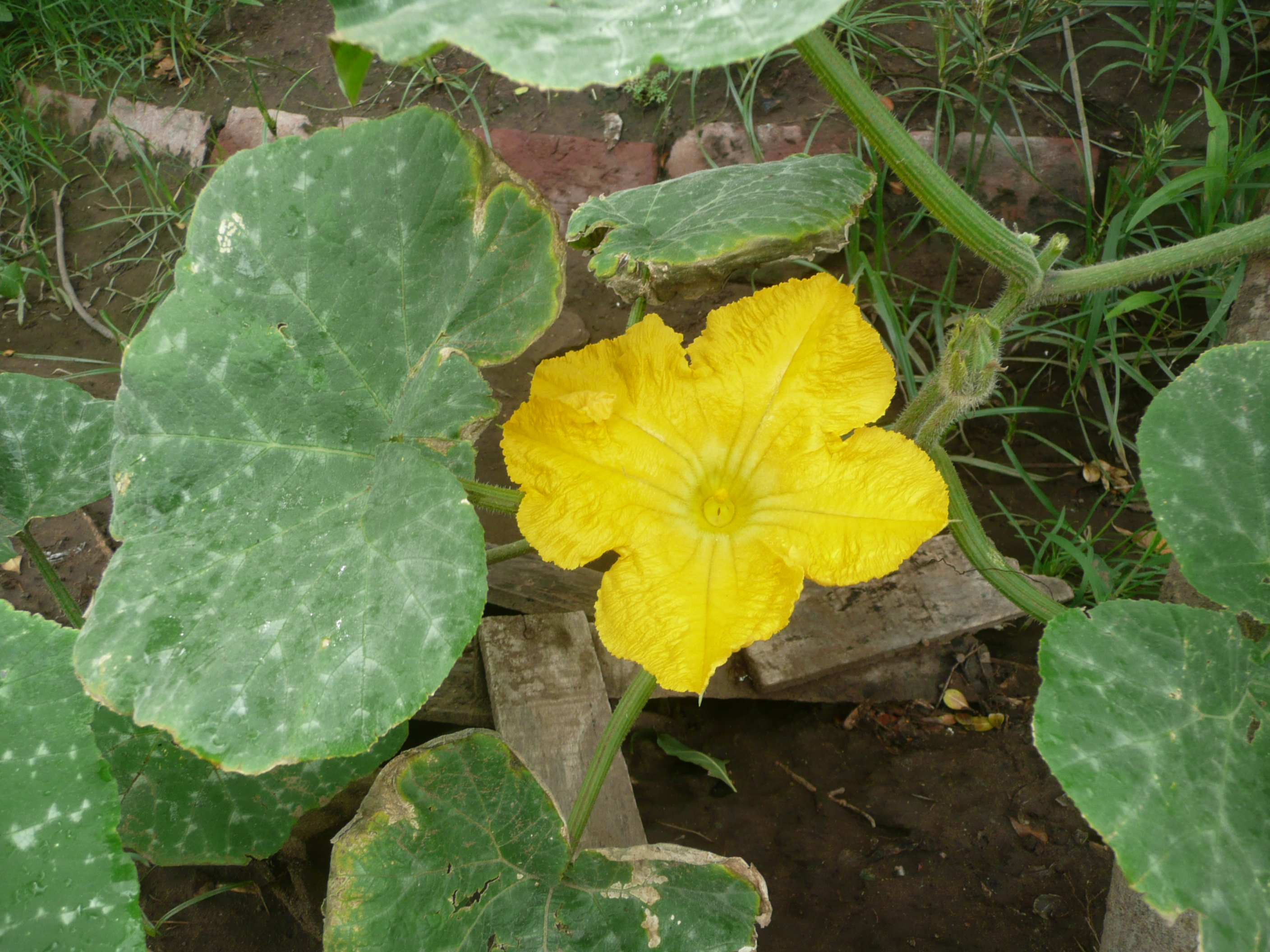 Fortín Olavarría, Buenos Aires province, Argentina.